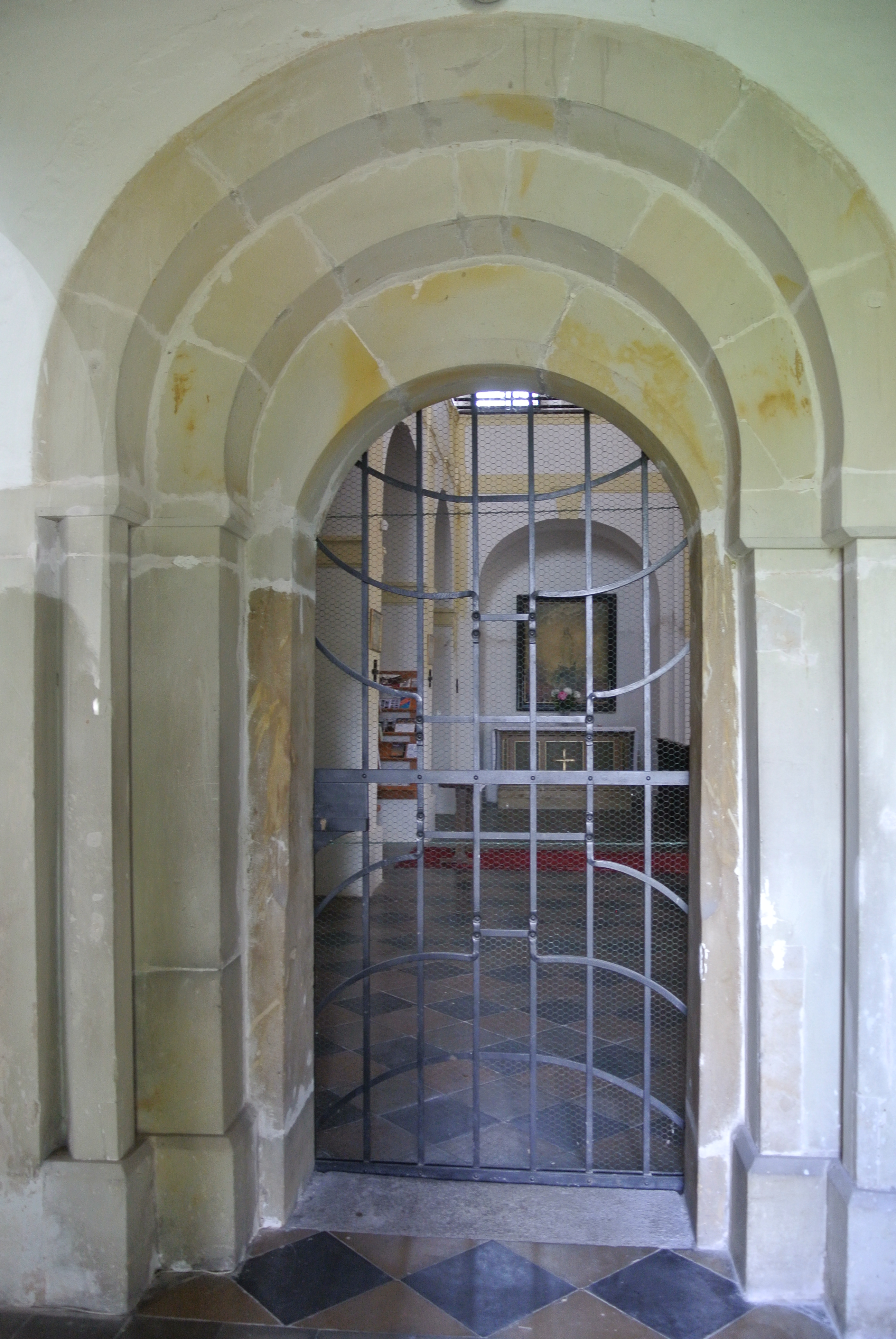 Detaily kostela v Charvatcích